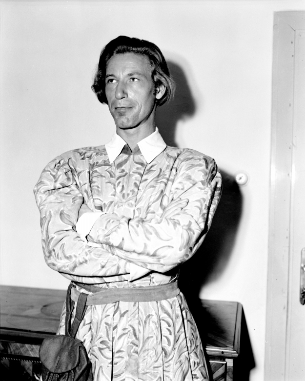 Josef Meinrad vor einem Auftritt als Guter Gesell im Schauspiel Jedermann (Garderobe des Salzburger Festspielhauses)